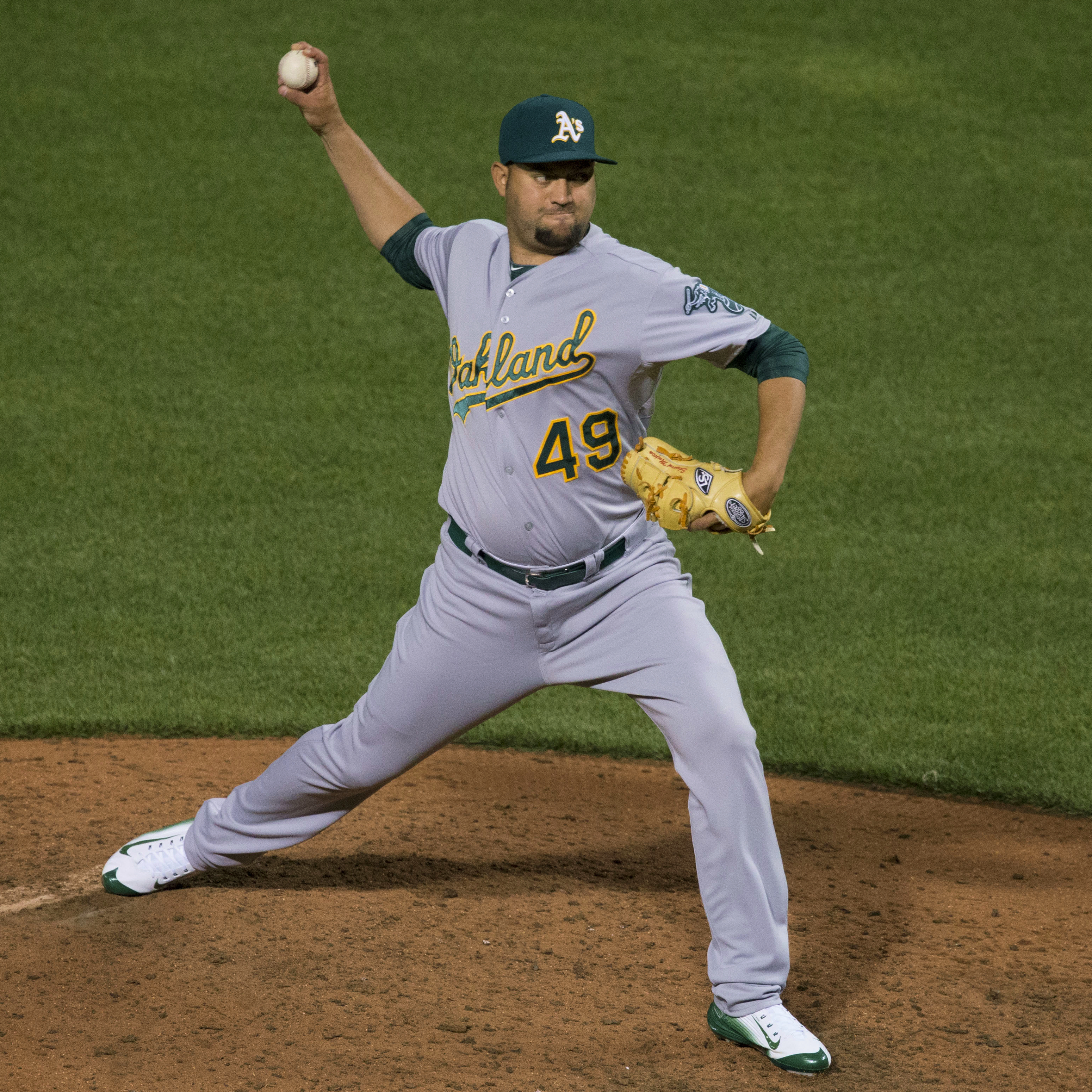 Edward Mujica